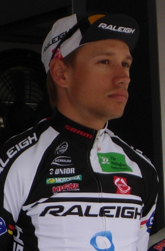 Tour de Bretagne 2013 - Présentation des équipes au départ de la deuxième étape à Ploemel - Équipe Raleigh Depicted person: Richard Lang